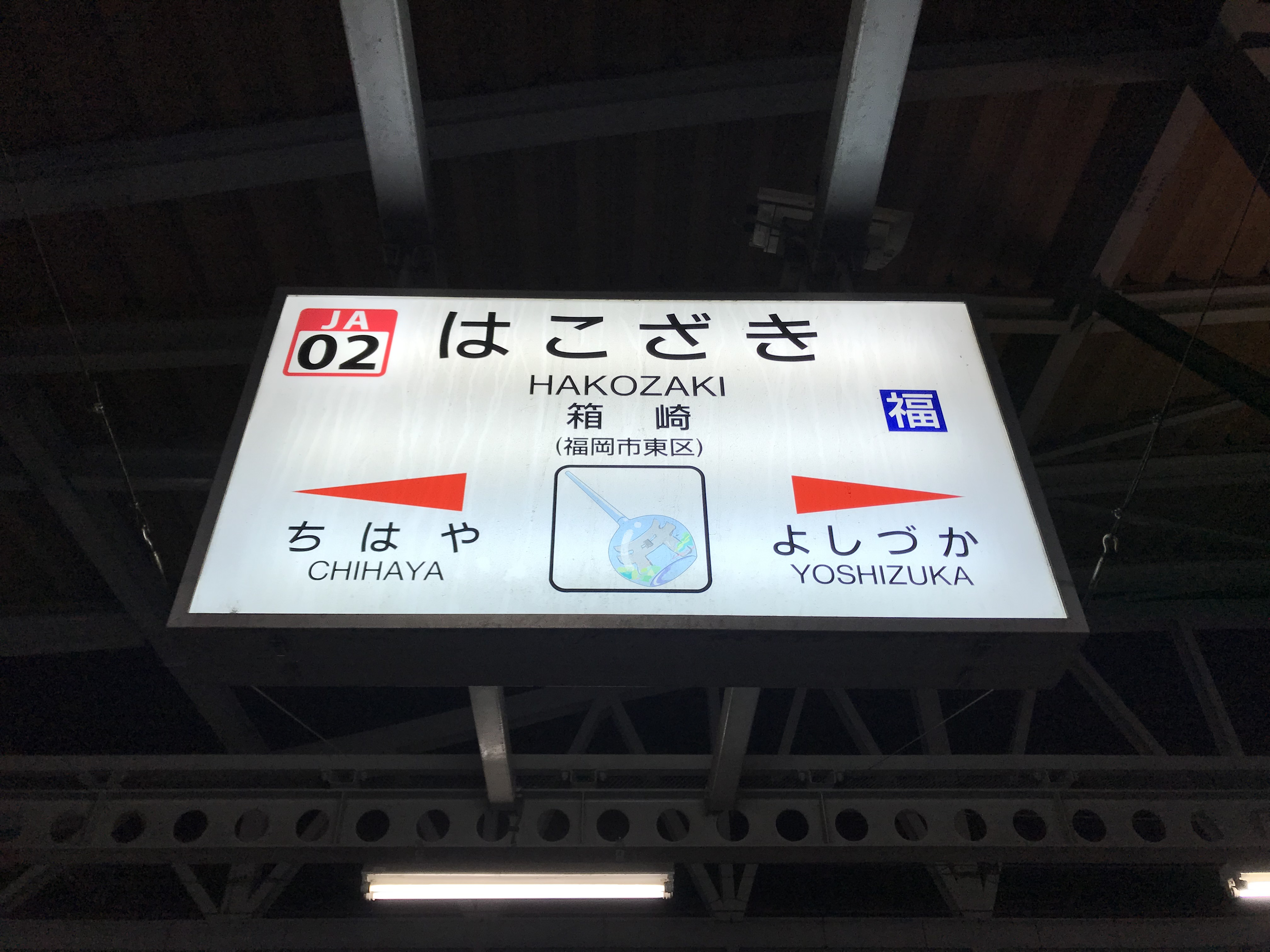 箱崎駅の駅名標。イラストは筥崎宮の放生会